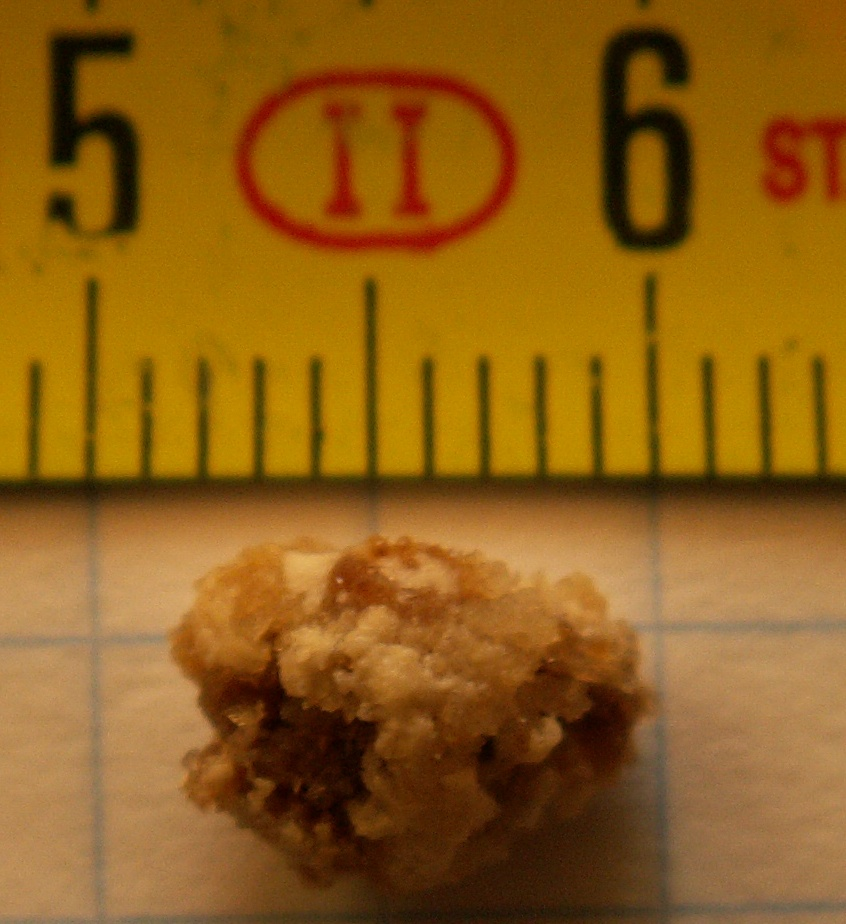 Kidney stone